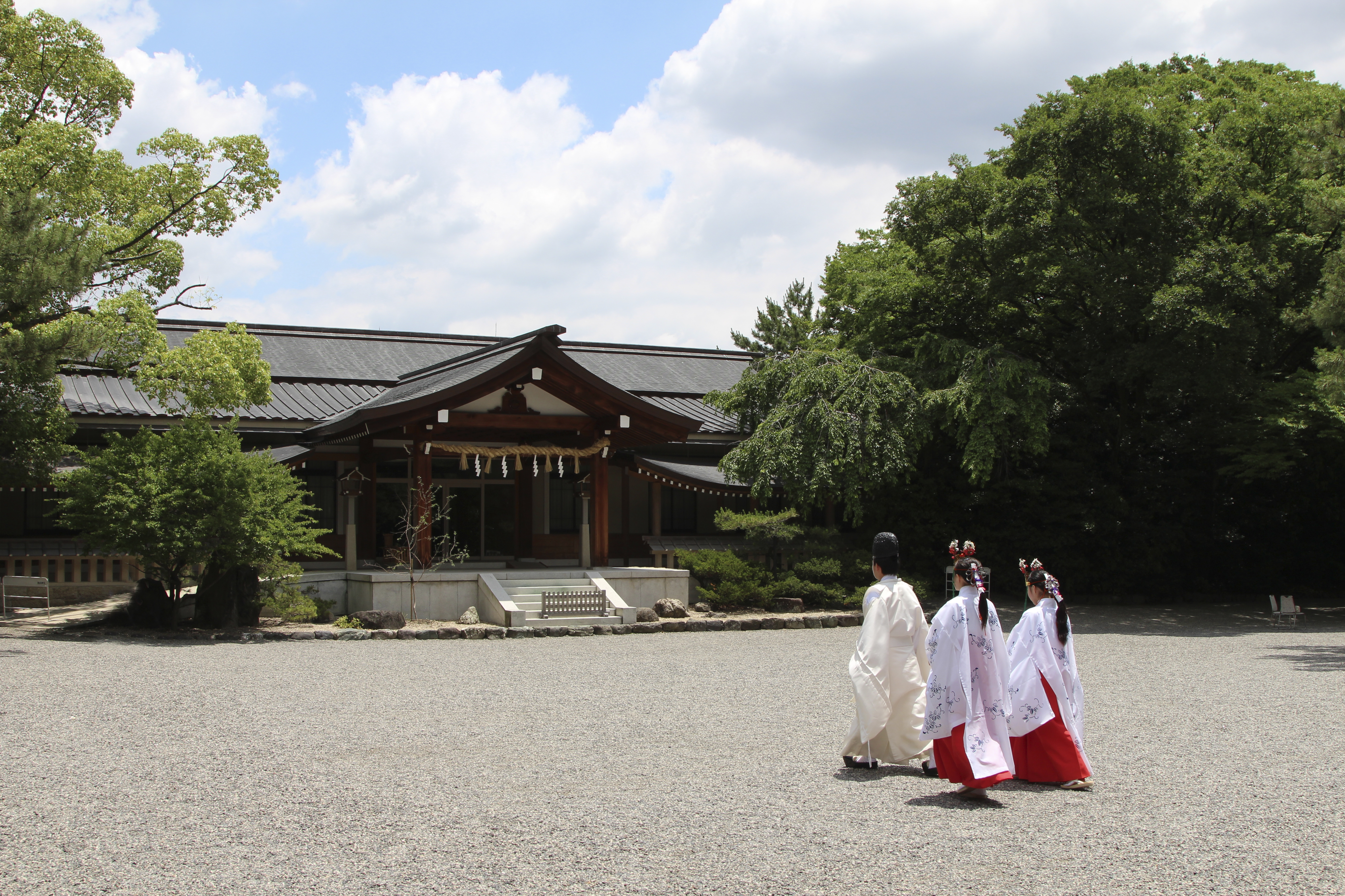 熱田神宮 斎館・勅使館（さいかん・ちょくしかん）